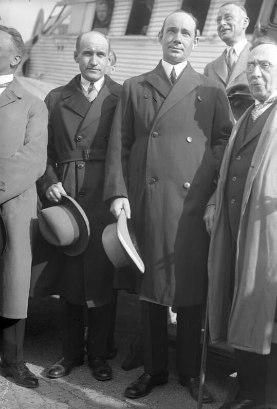 Mit dem Unterseeboot nach dem Nordpol! Der bekannte Nordpolflieger Wilkins beabsichtigt, in diesem Jahre bestimmt den Nordpol mit einem Unterseeboot zu errichen. Er hält für den Beginn seiner Expedition den Monat Juni für den Geeignetsten.